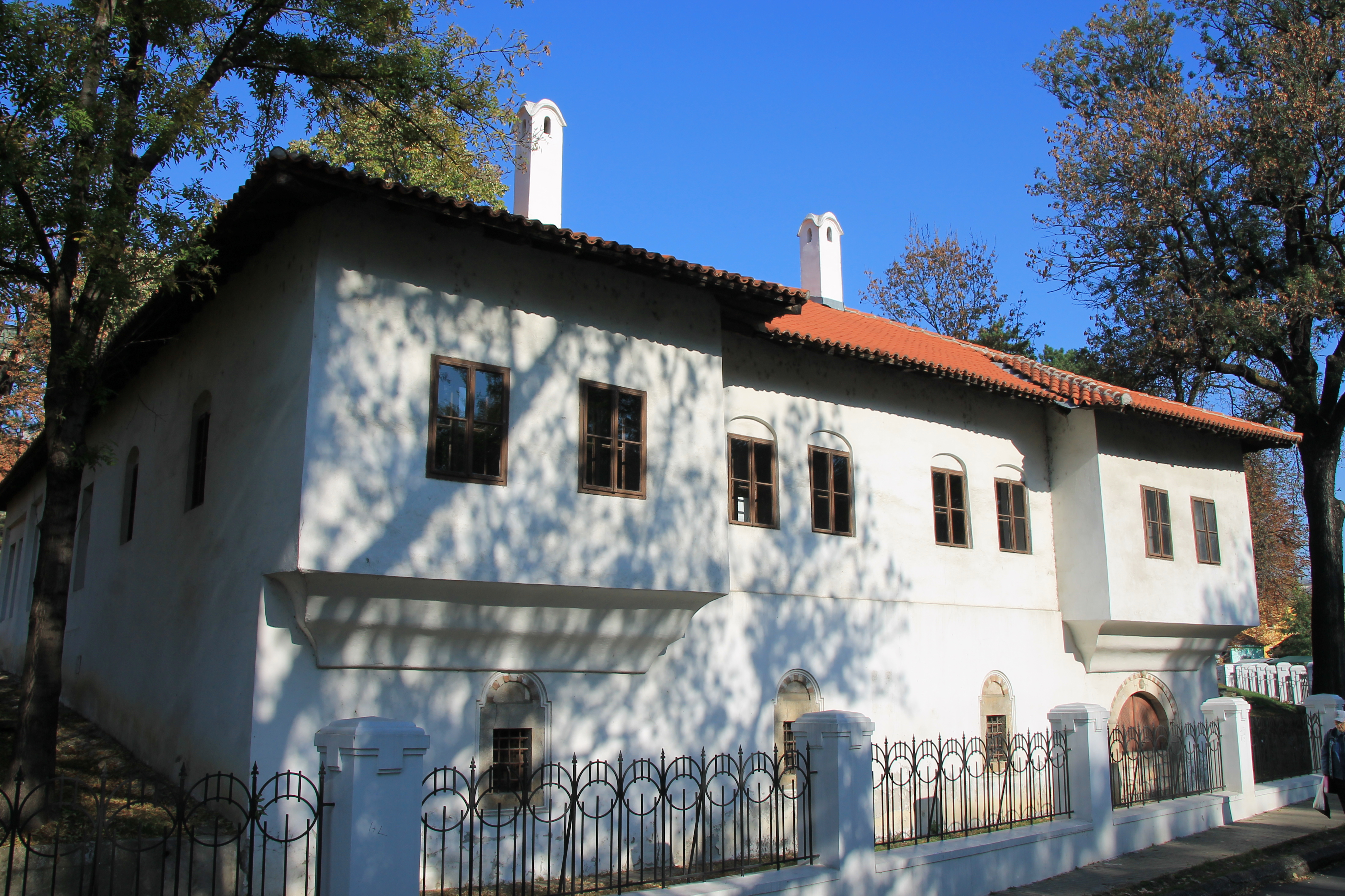 Amidžin konak